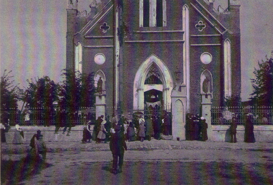 Boże Ciało 1915 rok